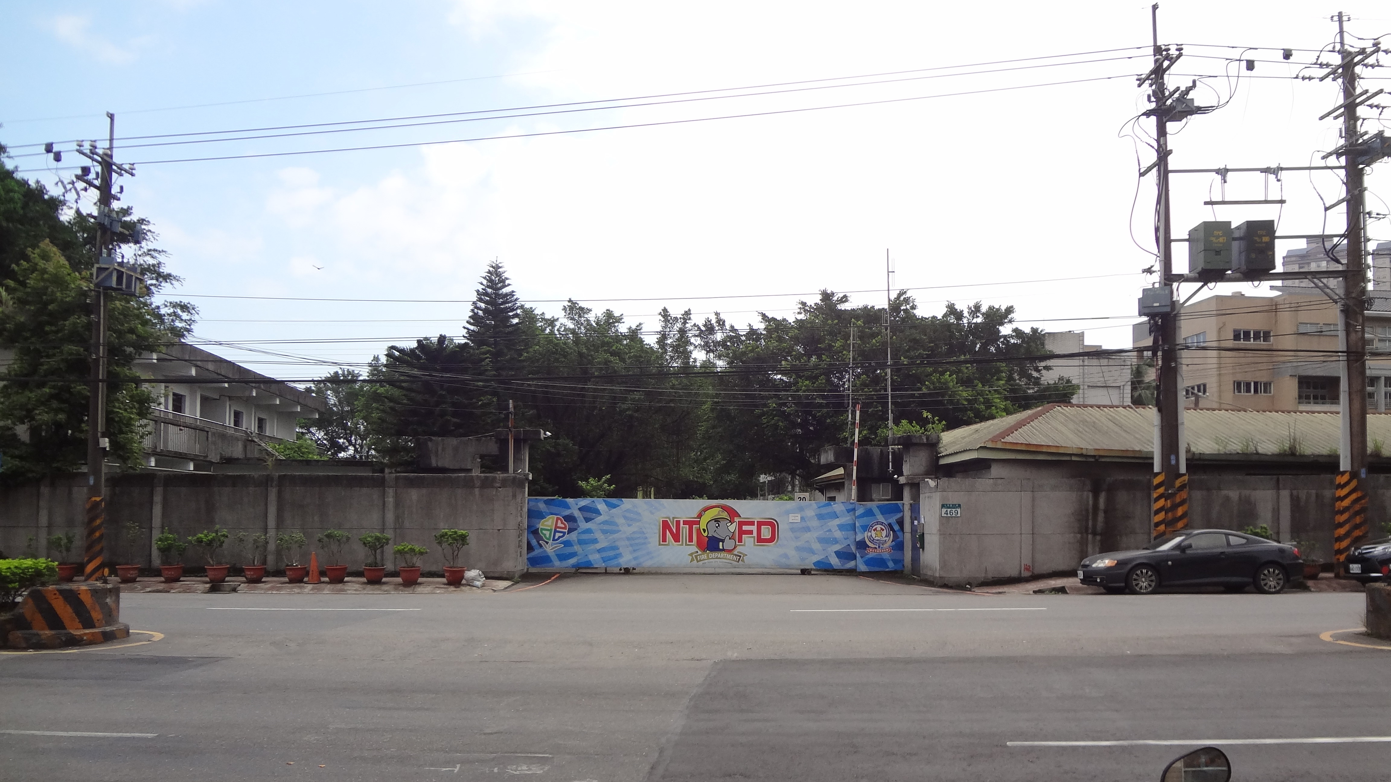 中文（台灣）: 新北市政府消防局保長坑訓練中心，位於新北市汐止區大同路三段469號，原中華民國憲兵保長坑營區。